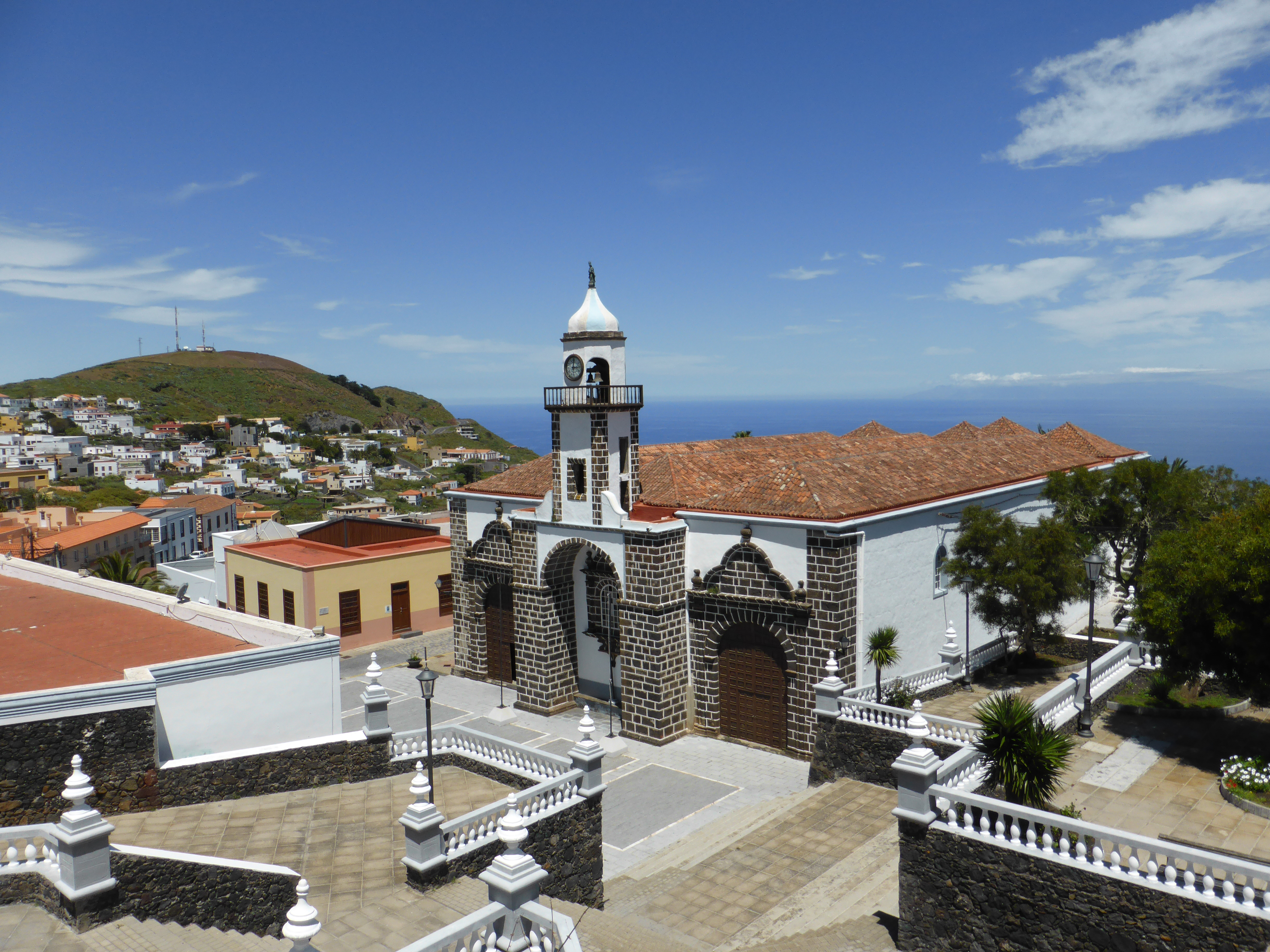 Iglesia de Nuestra Señora de la Concepción (Valverde). Barroca y clasicista, terminada en el año 1820, tiene un campanario octogonal. Iglesia declarada Bien de Interés Cultural.